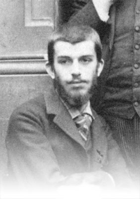 Élie Halévy (1870-1937), photographe non précisé, vers 1890, sans doute extrait d'une photo de groupe de l’École Normale Supérieure (Paris)